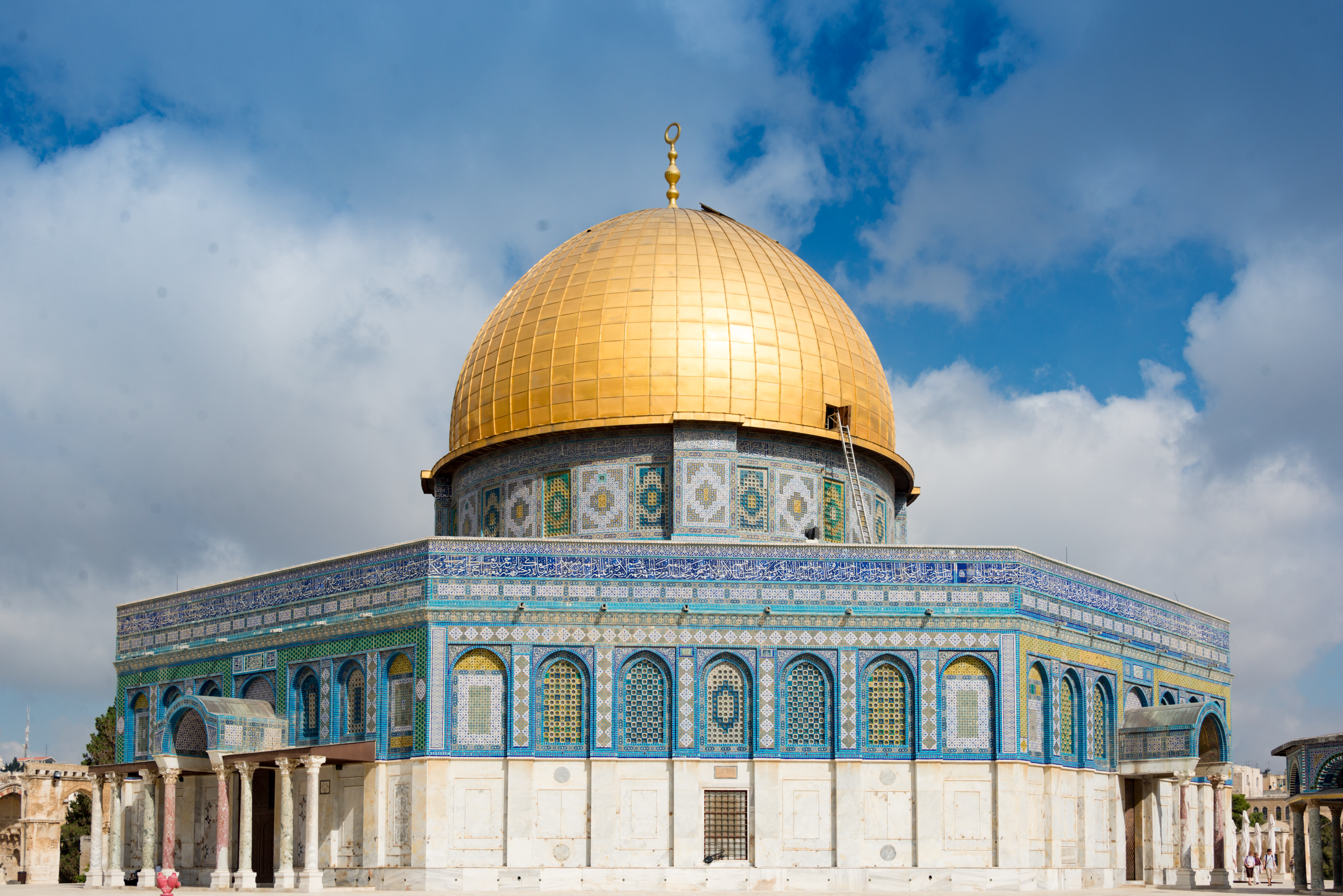 18404-Jerusalem Jerusalem